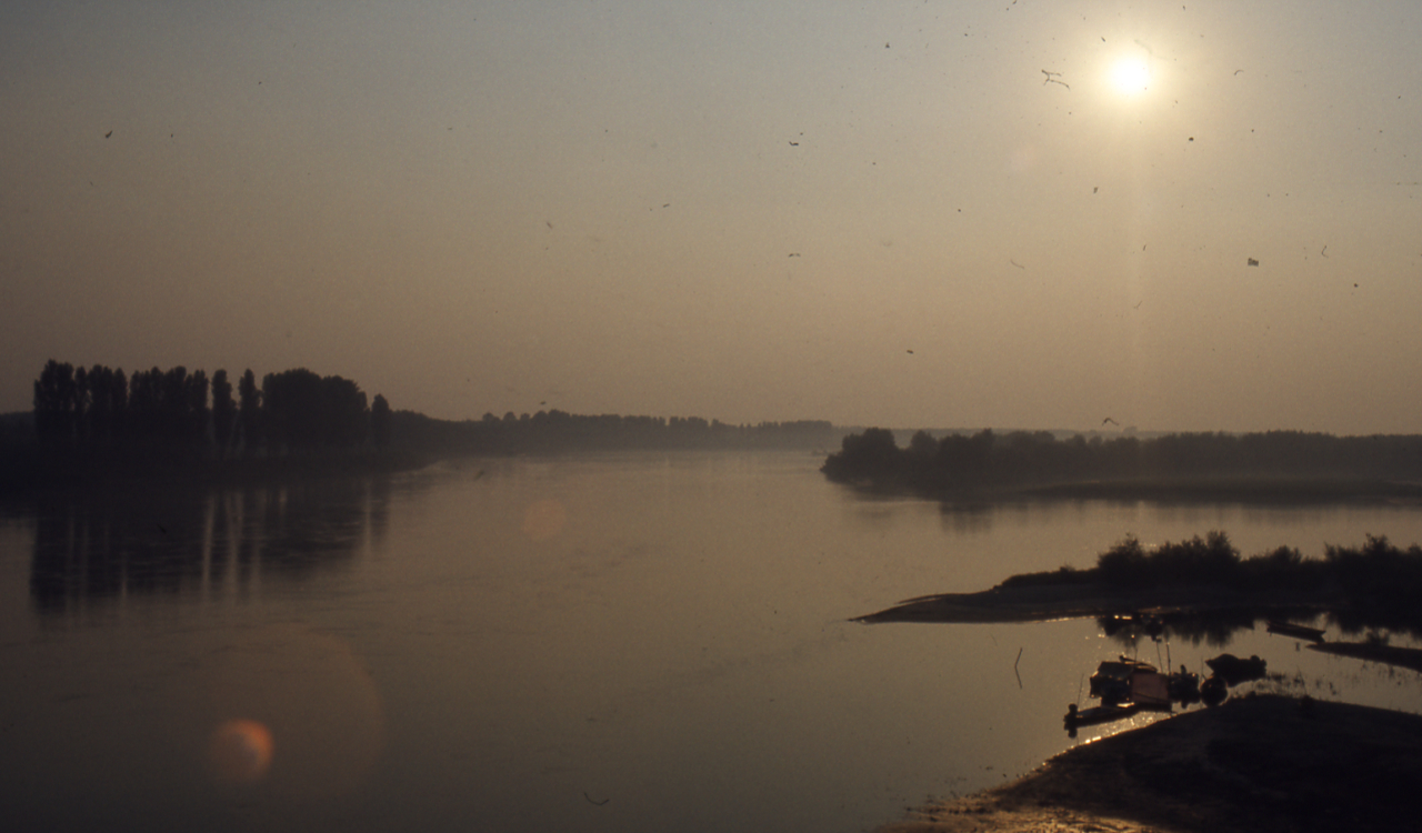 /00), presso Archivio Paolo Monti. Territorio: n. 1000 negative circa relative alla campagna fotografica eseguita nel periodo dicembre '74-febbraio '75 [...] - Mesola, Valli di Comacchio, Verginese, Belriguardo, Copparo, Pomposa, Chiaviche, Bonifiche, La Stellata, Cento etc. - Fonte: Fattura di Paolo Monti: IV. Commesse/ Fattura n. 16/ Diapositive per audiovisivo Regione Emilia-Romagna (1973/10/22), presso Archivio Paolo Monti. N. 1000 diapositive a colori formato 35mm sugli aspetti del patrimonio naturale, artistico e culturale della Regione. Dal territorio di Parma e Piacenza, fino a Ravenna e oltre, compreso il ferrarese e il Delta del Po, gli Appennini [...]Rubrica